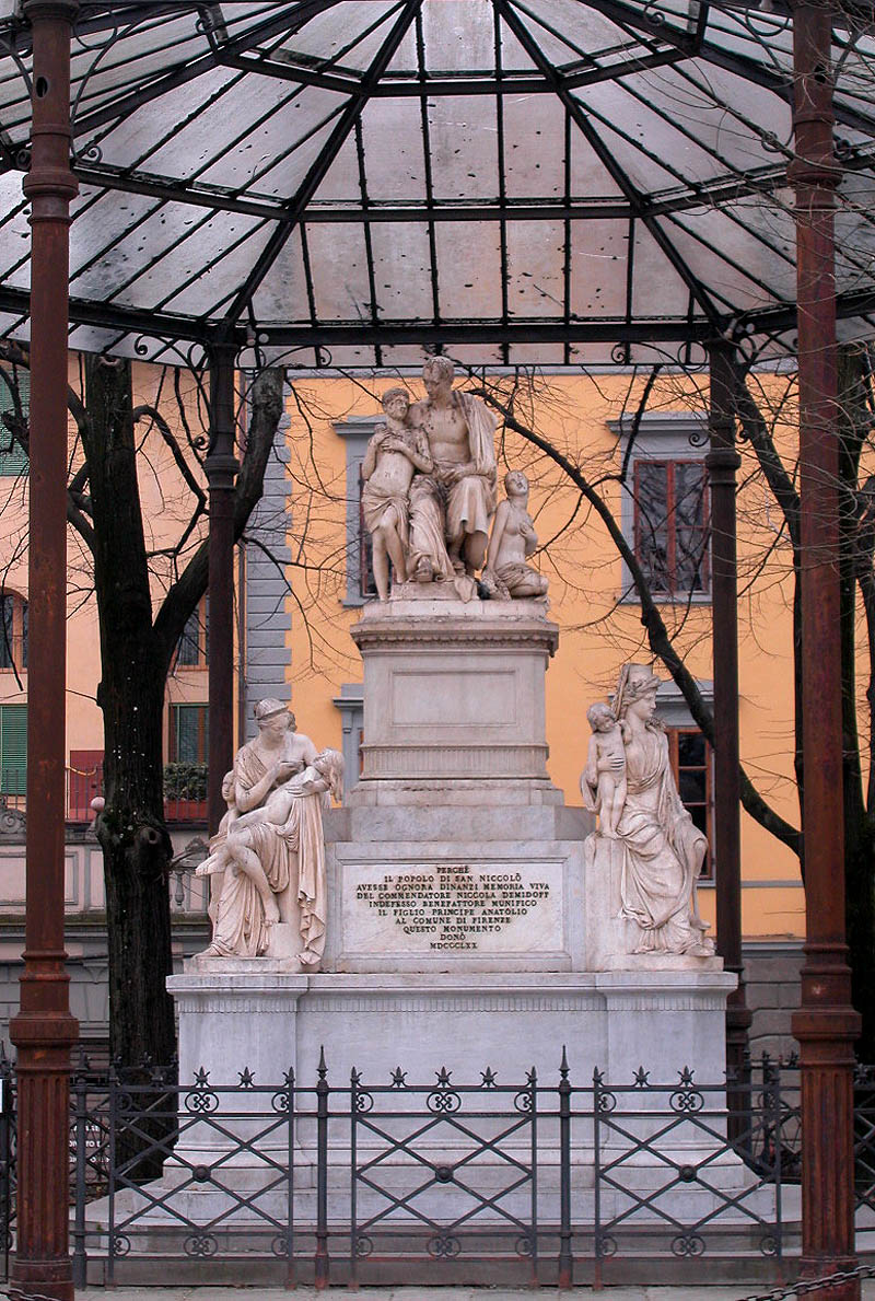 Monumento a Niccolò Demidoff di Lorenzo Bartolini a Firenze